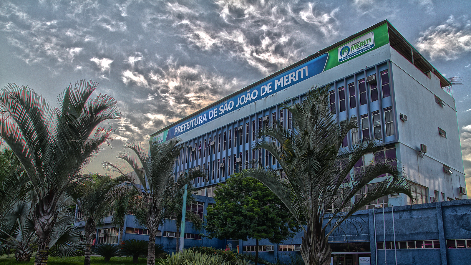 Sede da Prefeitura Municipal de São João de Meriti